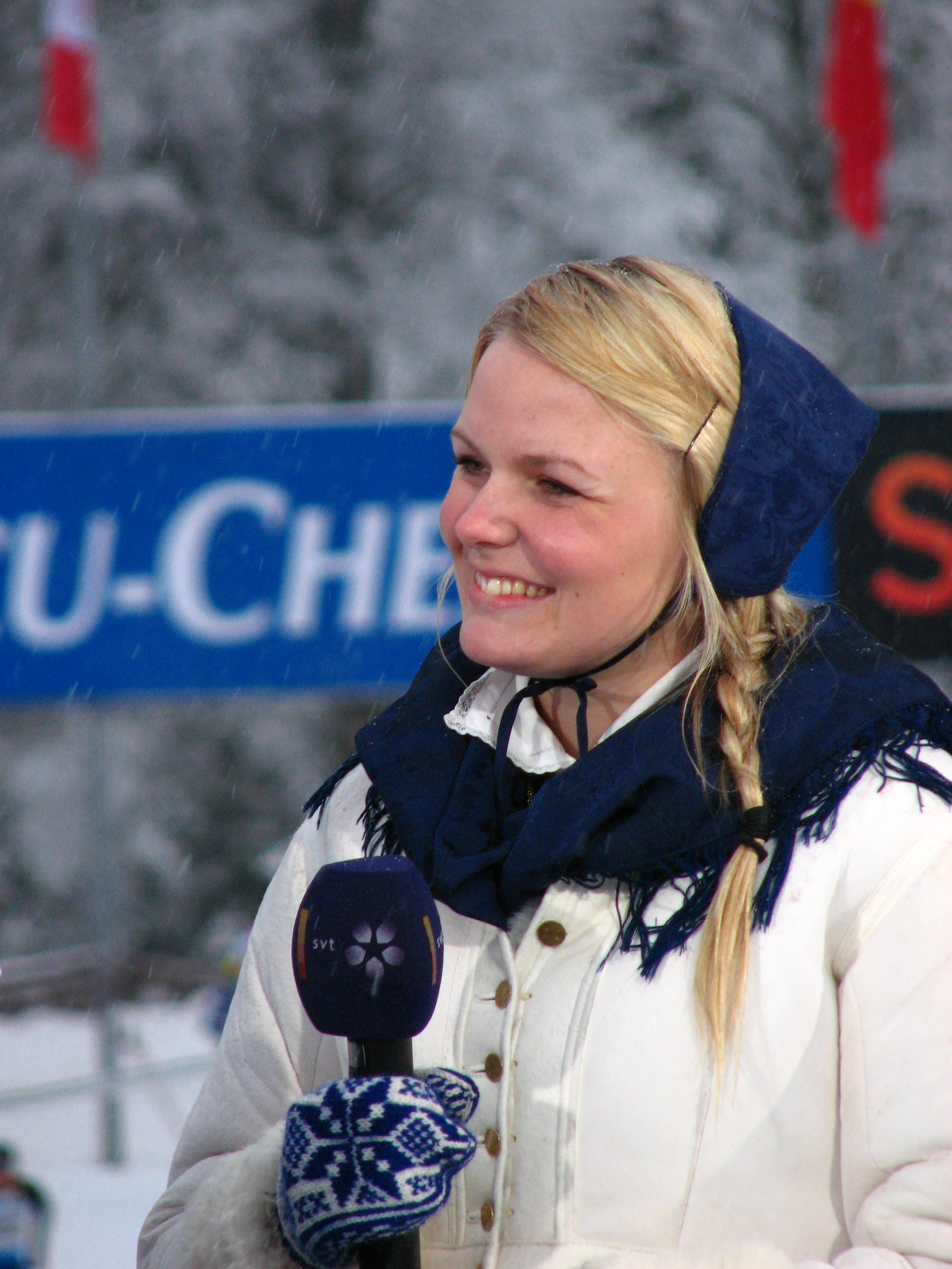 Kranskullan, Vasaloppet 2008, Carolina Westling intervjuas av SVT vid vasaloppsstarten. Sälen, Sverige